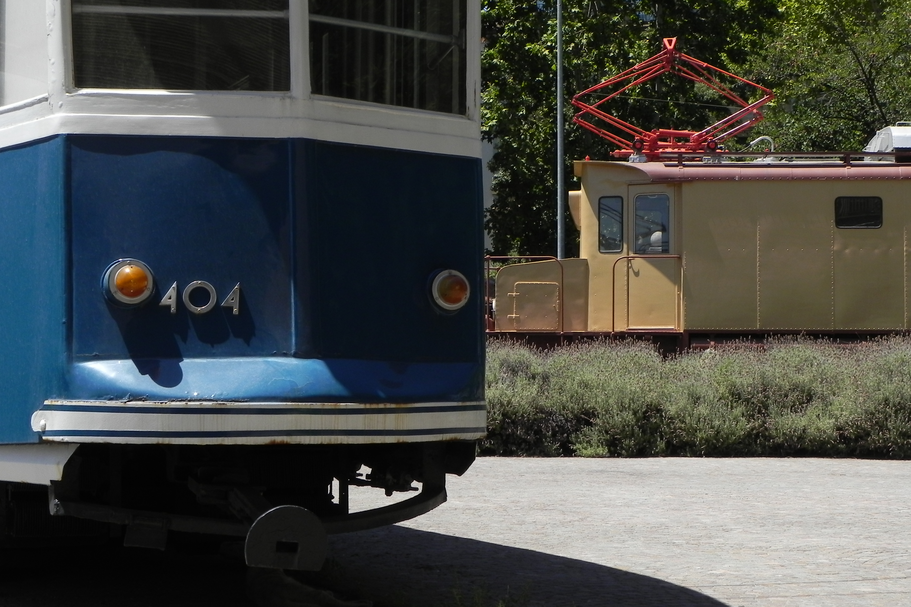 Roma, Museo di Porta San Paolo.